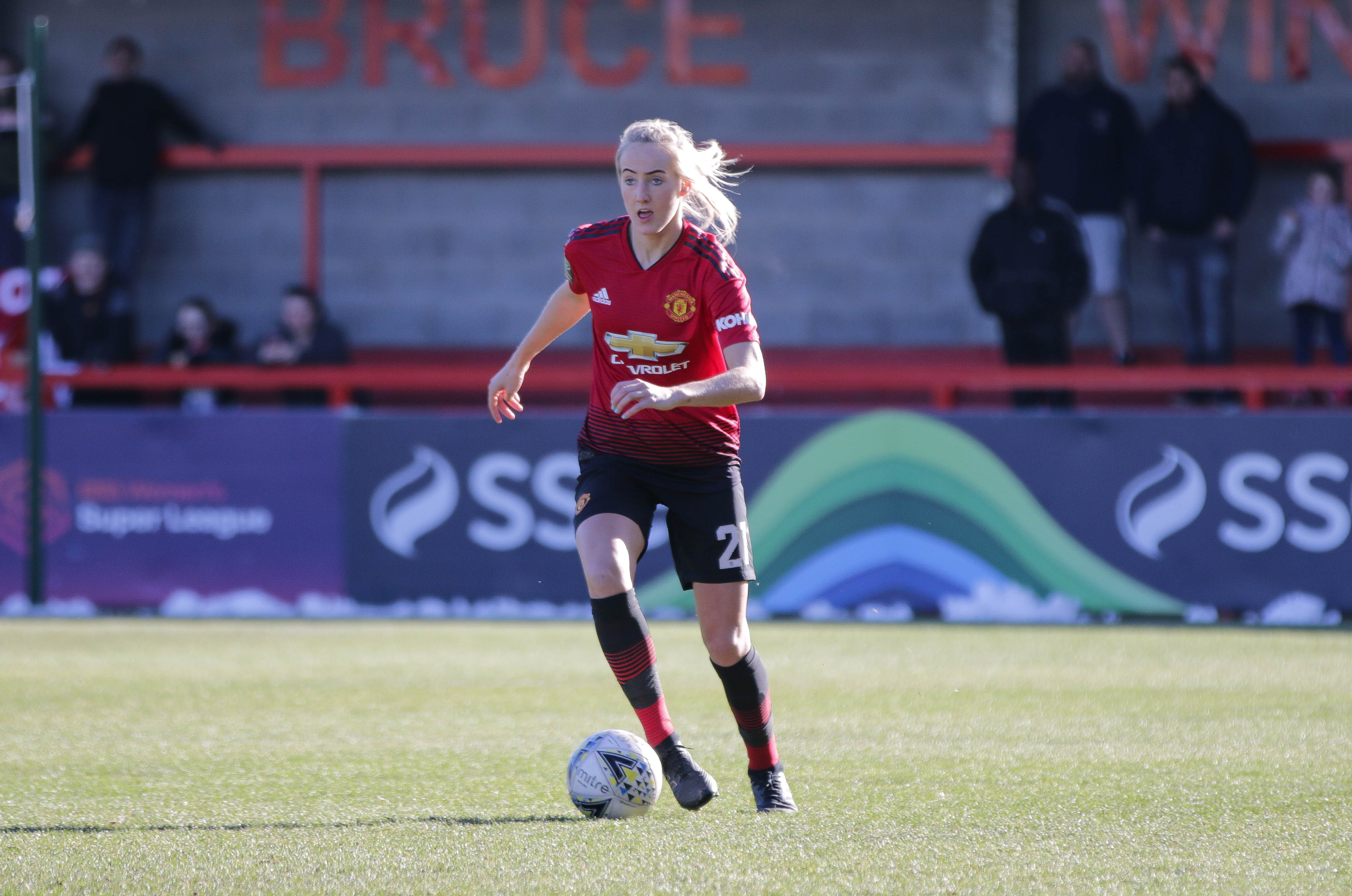 Millie Turner